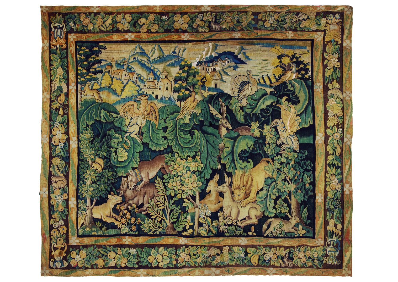 Tapisserie de basse-lisse représentative des verdures à "feuilles de choux", dites parfois "type Anglards-de-Salers", laine et soie, seconde moitié du XVIe siècle. Collection du Musée de la tapisserie, Aubusson.